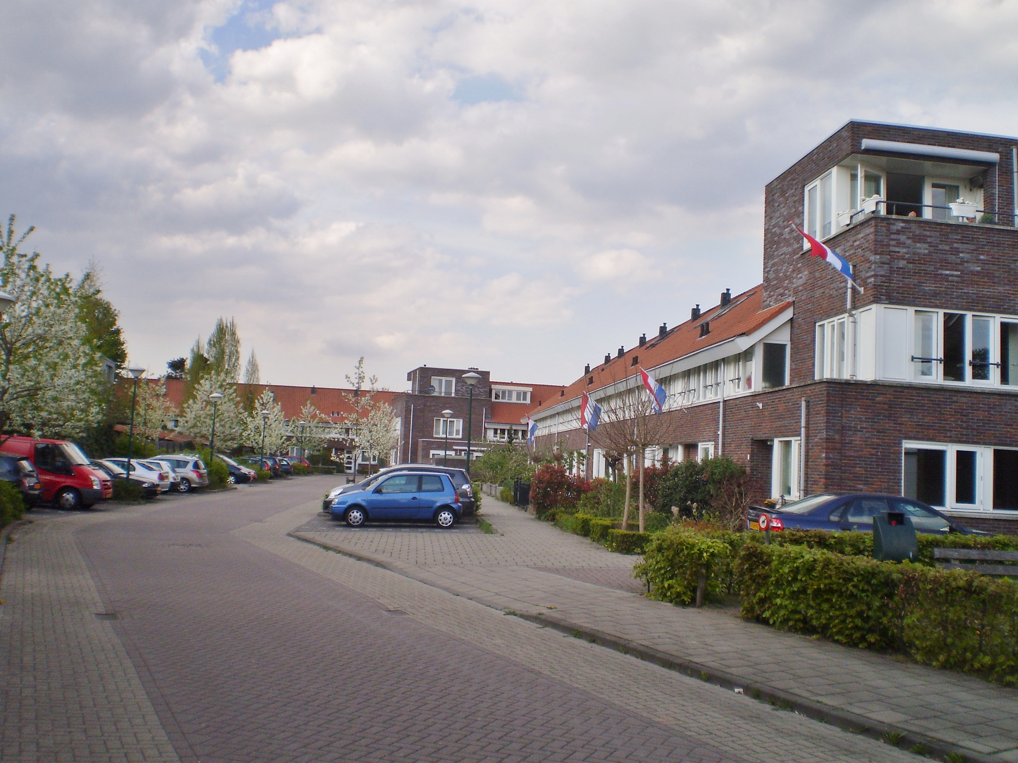 Pluimhof op het vroegere terrein van Bosch en Keuning